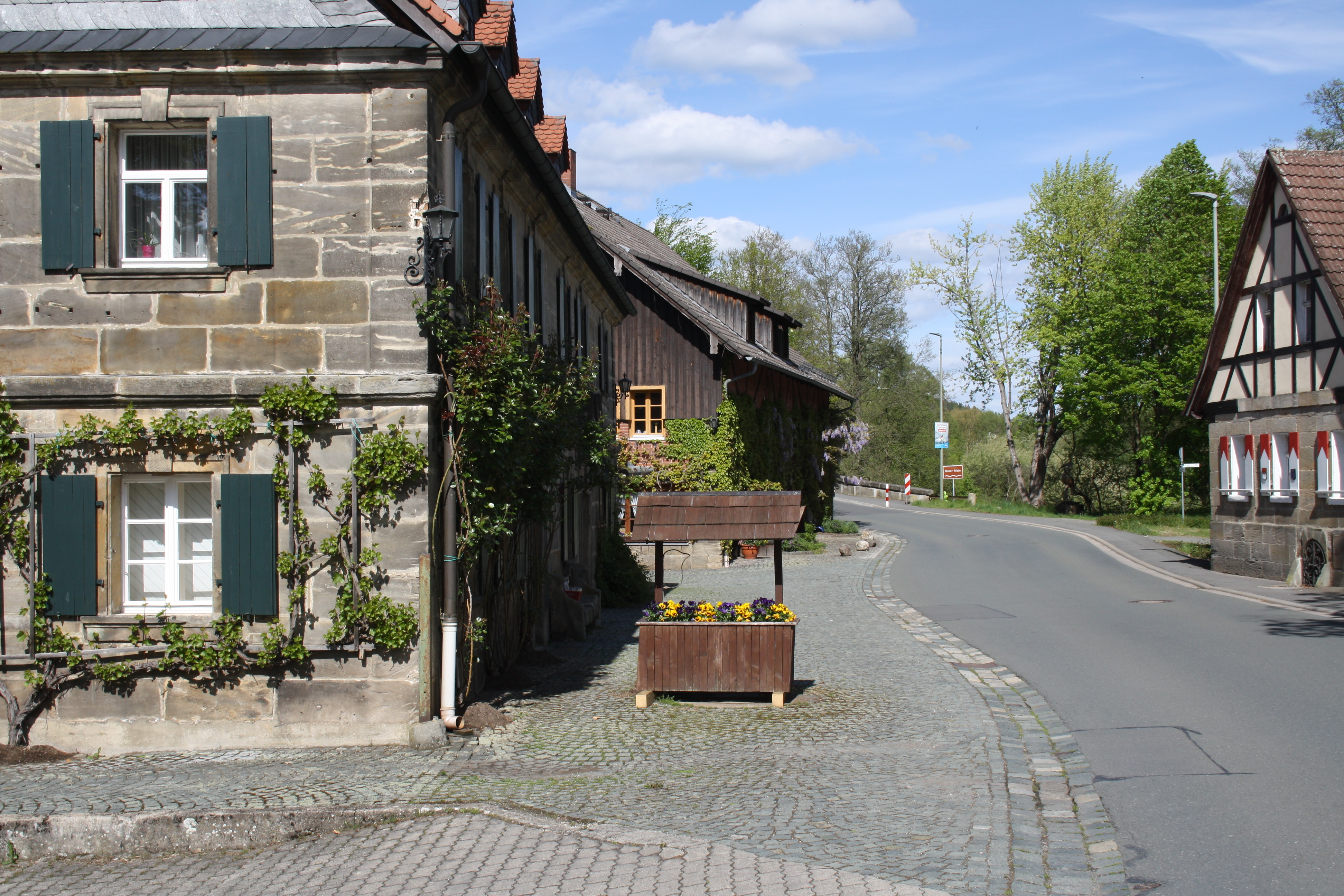 Altdrossenfeld